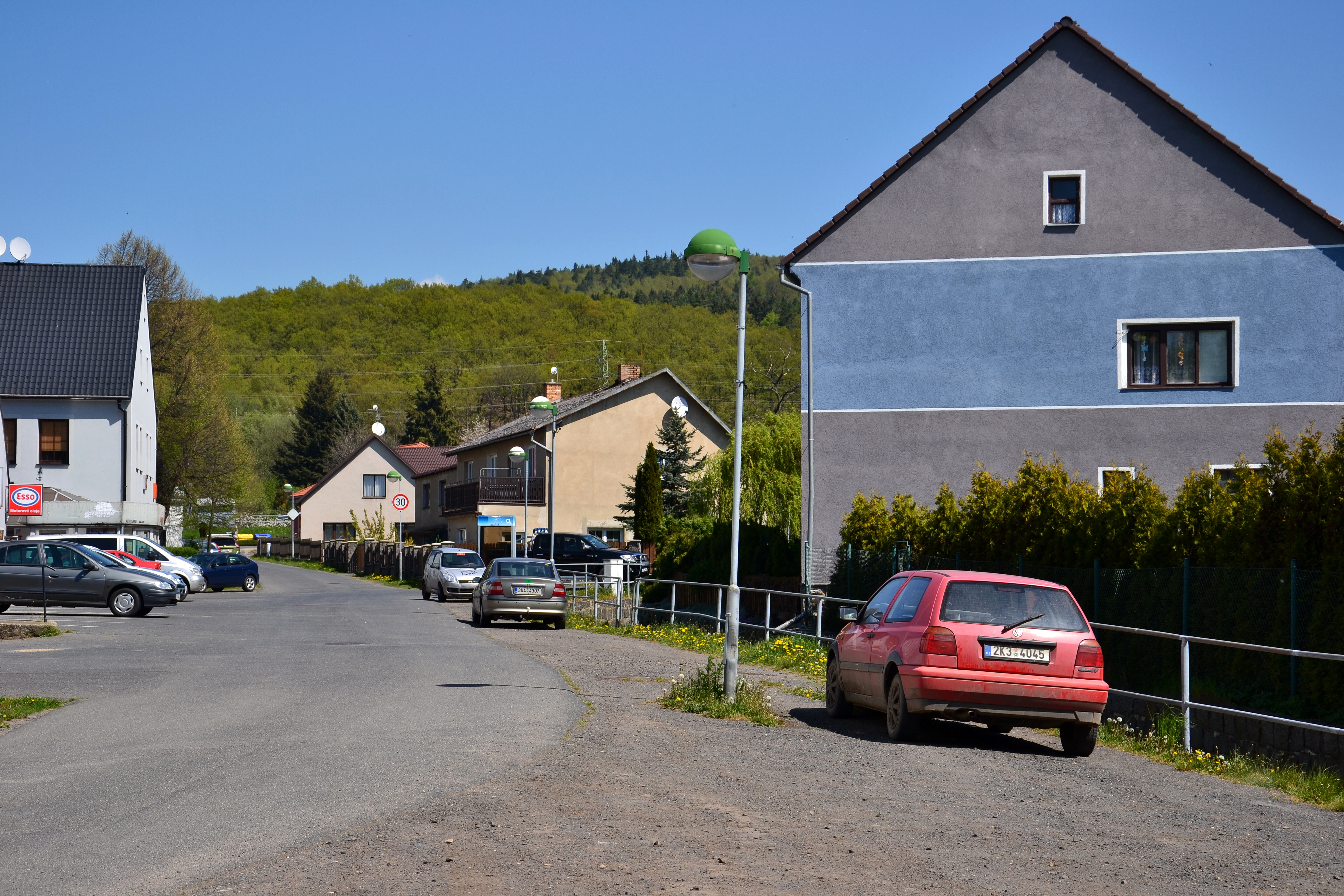 Náves